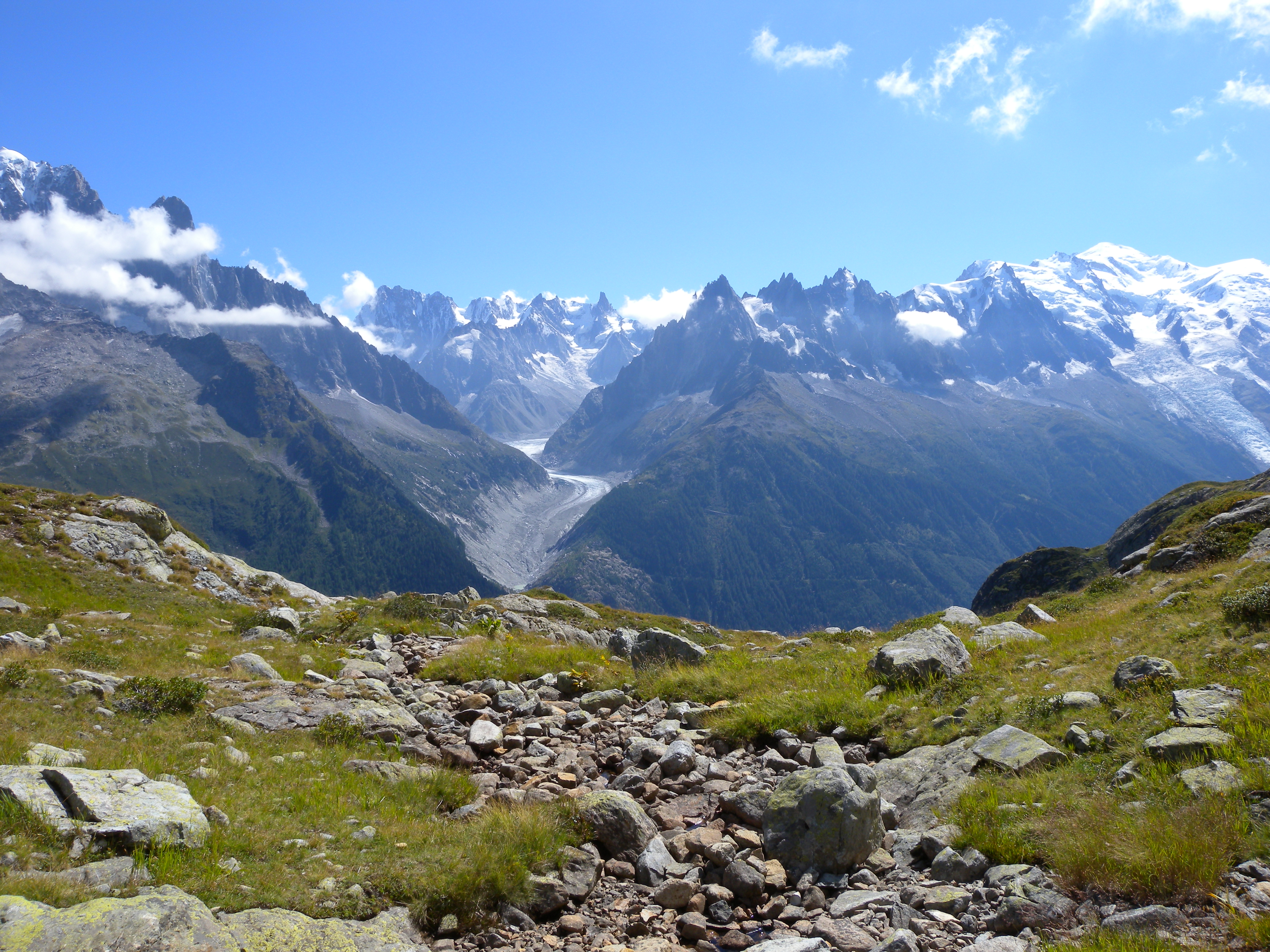 Massif du Mont Blanc et mer de Glace vus du lac de Cheserys